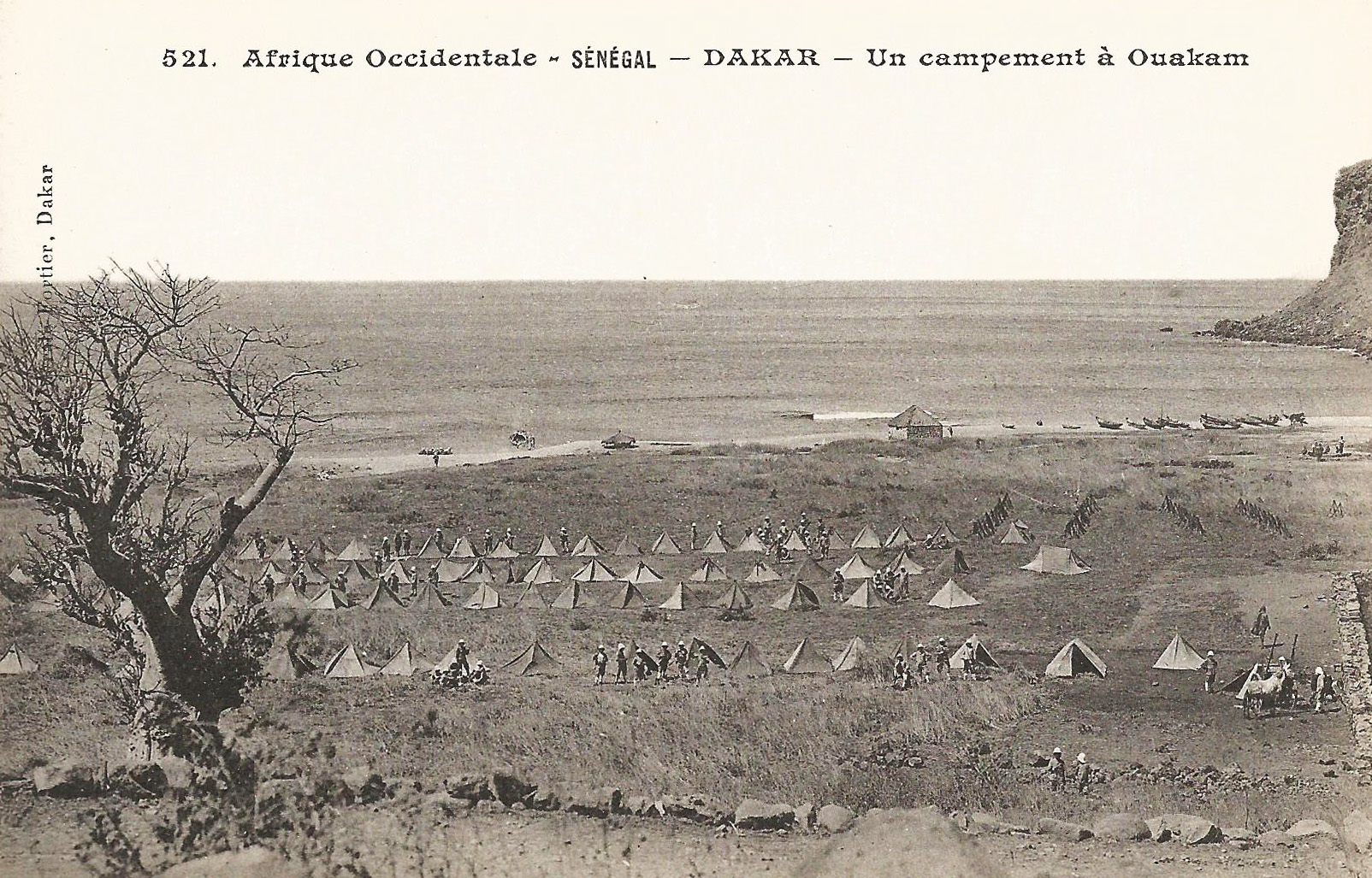 François-Edmond Fortier, Dakar. Un campement à Ouakam. Afrique Occidentale - Sénégal.